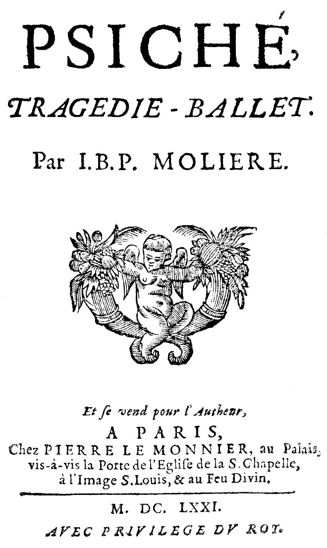 La première édition du texte(1671, chez Pierre Le Monnier).